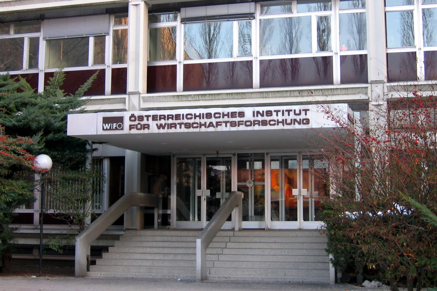 Österreichisches Institut für Wirtschaftsforschung, Vienna Arsenal